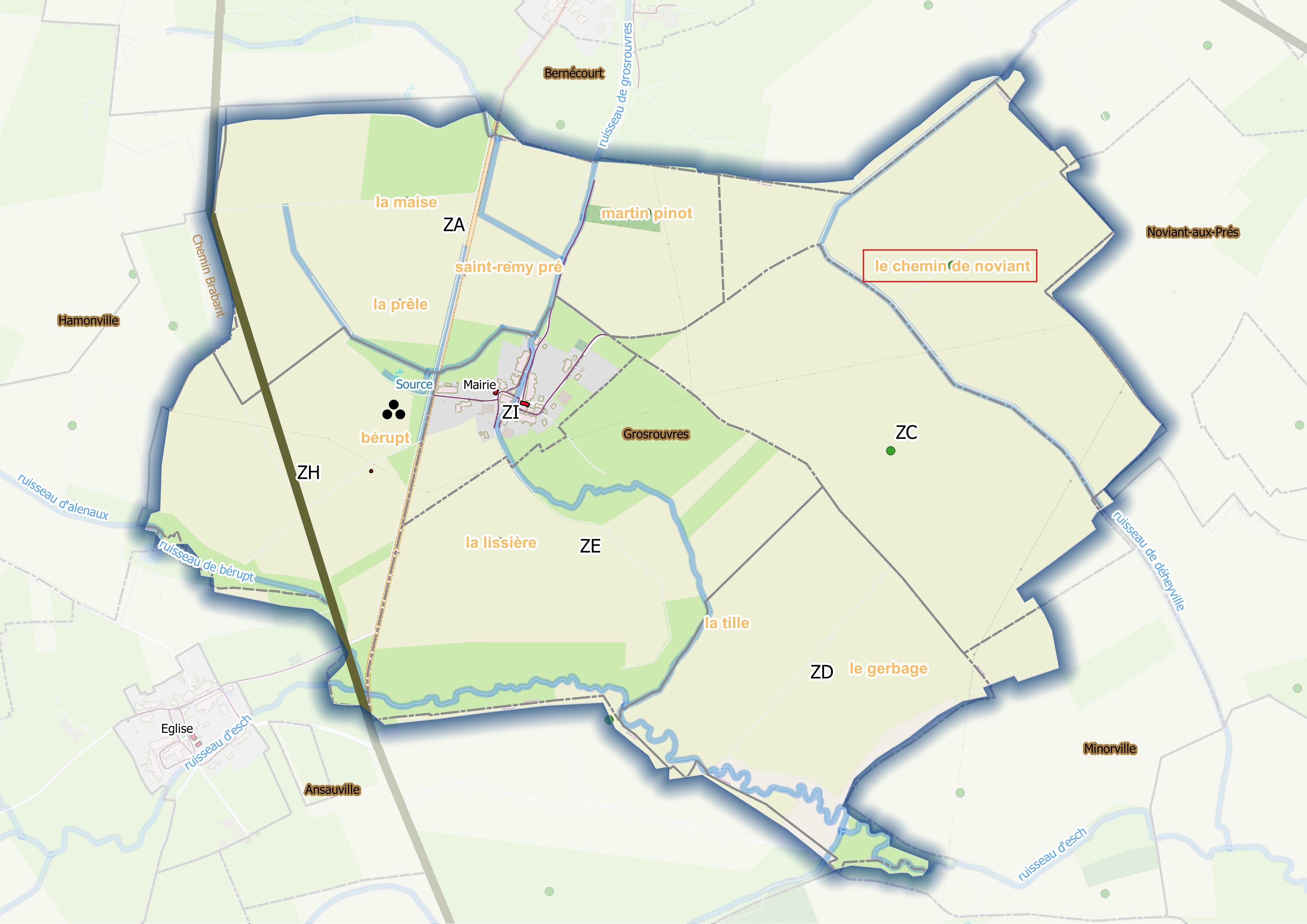 (Fig1) Grosrouvre - (ban communal)